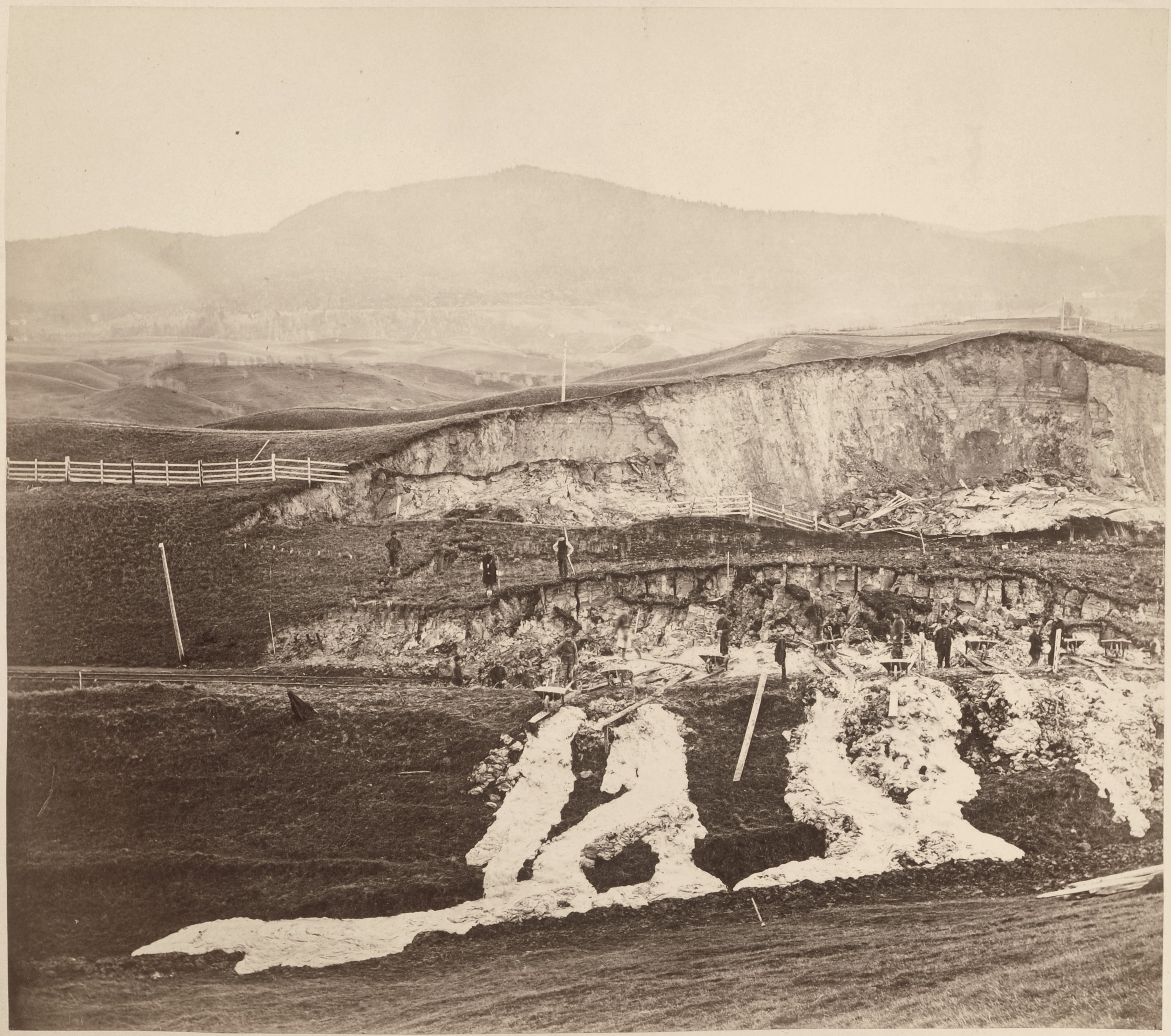 Leirras ved Stokke, omtrent en kilometer syd for Stokke stasjon, senere Nypen, Nypan. Raset dekker jernbanelinja og en masse folk er i gang med å fjerne massen fra sporet. Det er gjerder på begge sider av linjen. Vi ser tydelig raskanten og massen som dekker sporet. Det er tatt i bruk en masse trillebårer, spader og bøtter. Masse ble delvis dumpet i en skråning nedenfor jernbanelinja.